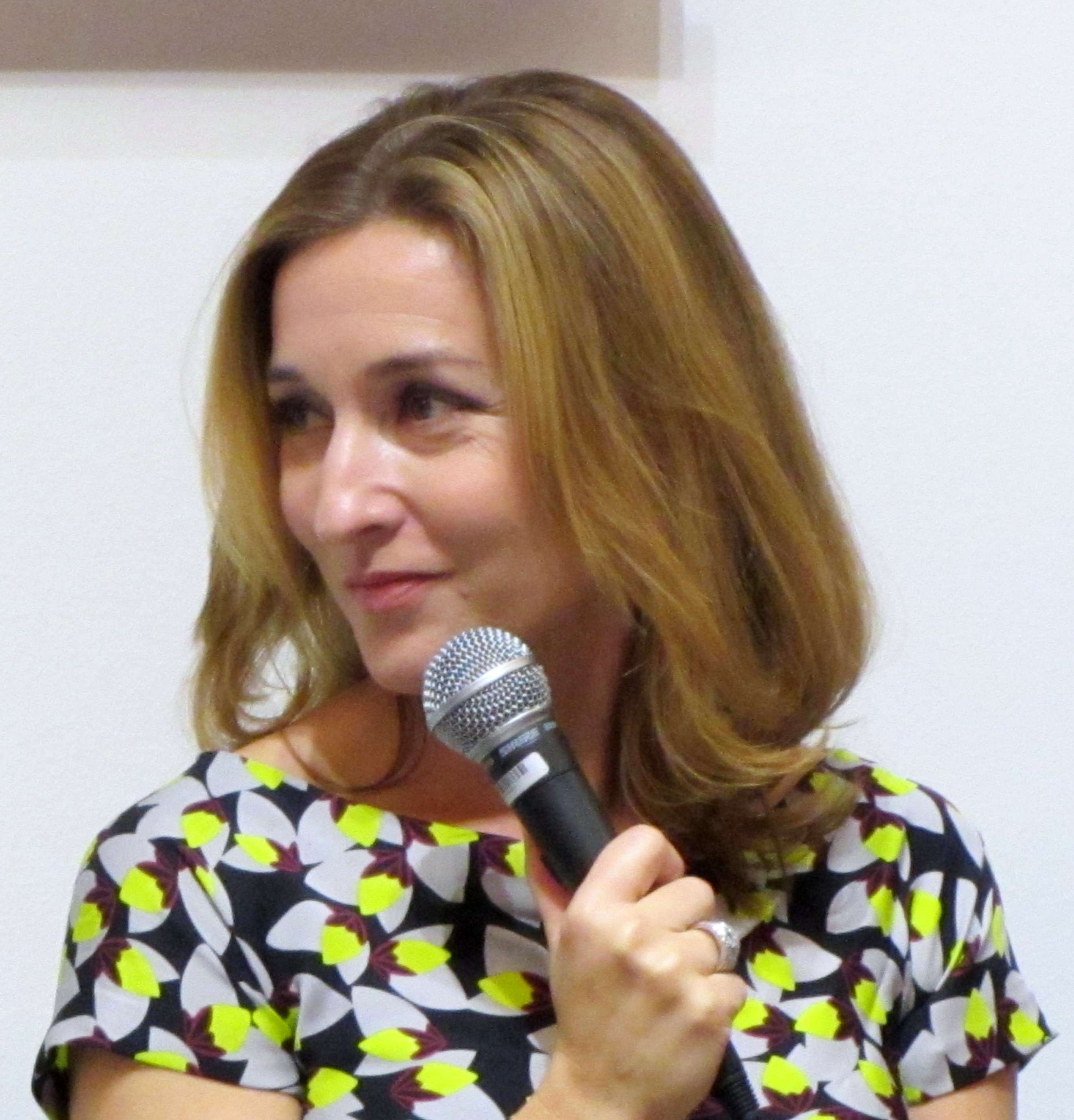 Martina Bonnier, svensk tidskriftsredaktör.